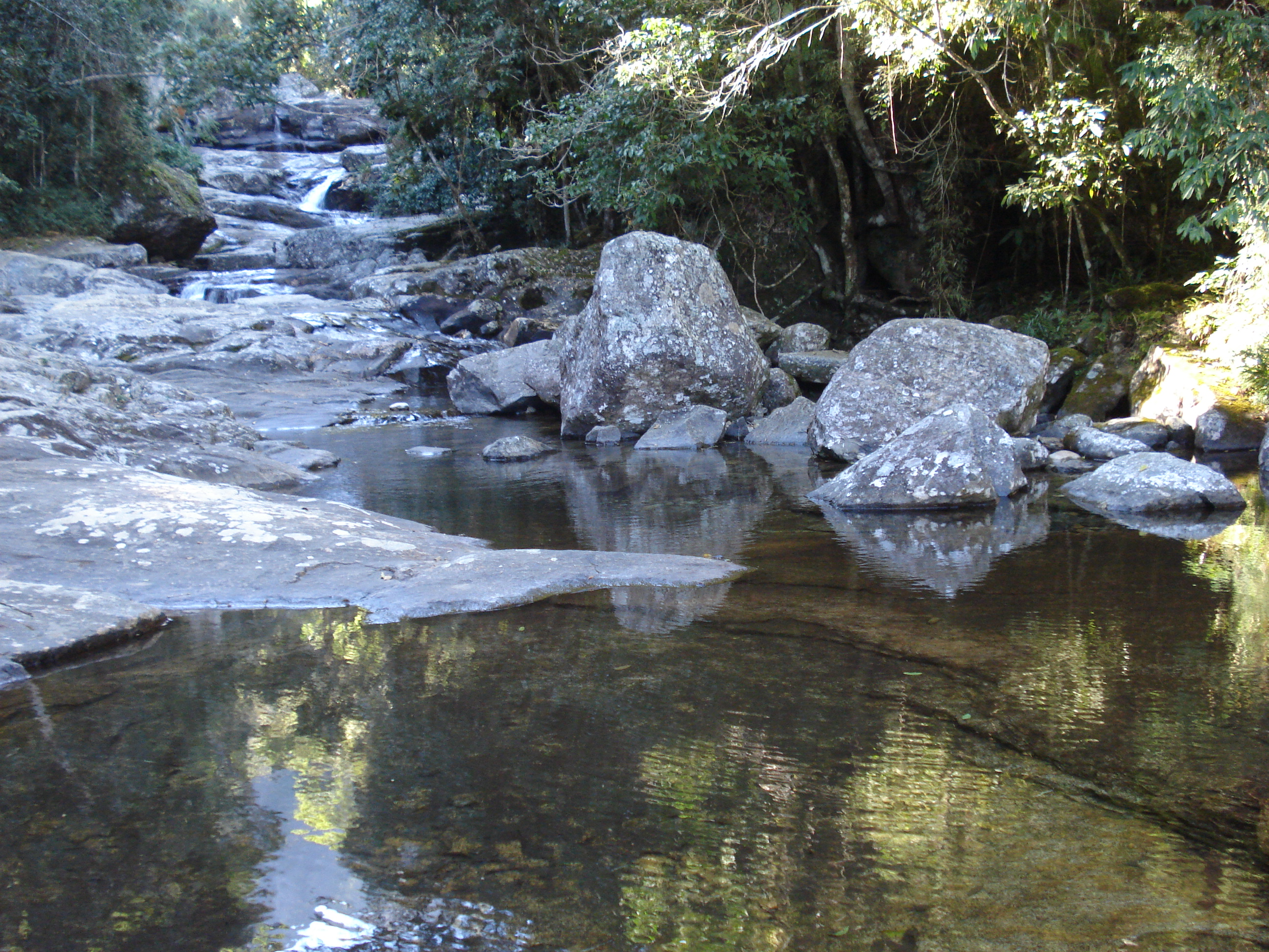 Trecho do Rio Caparaó durante o mês de julho de 2008 no Vale Verde próximo a portaria do Parque Nacional do Caparaó.